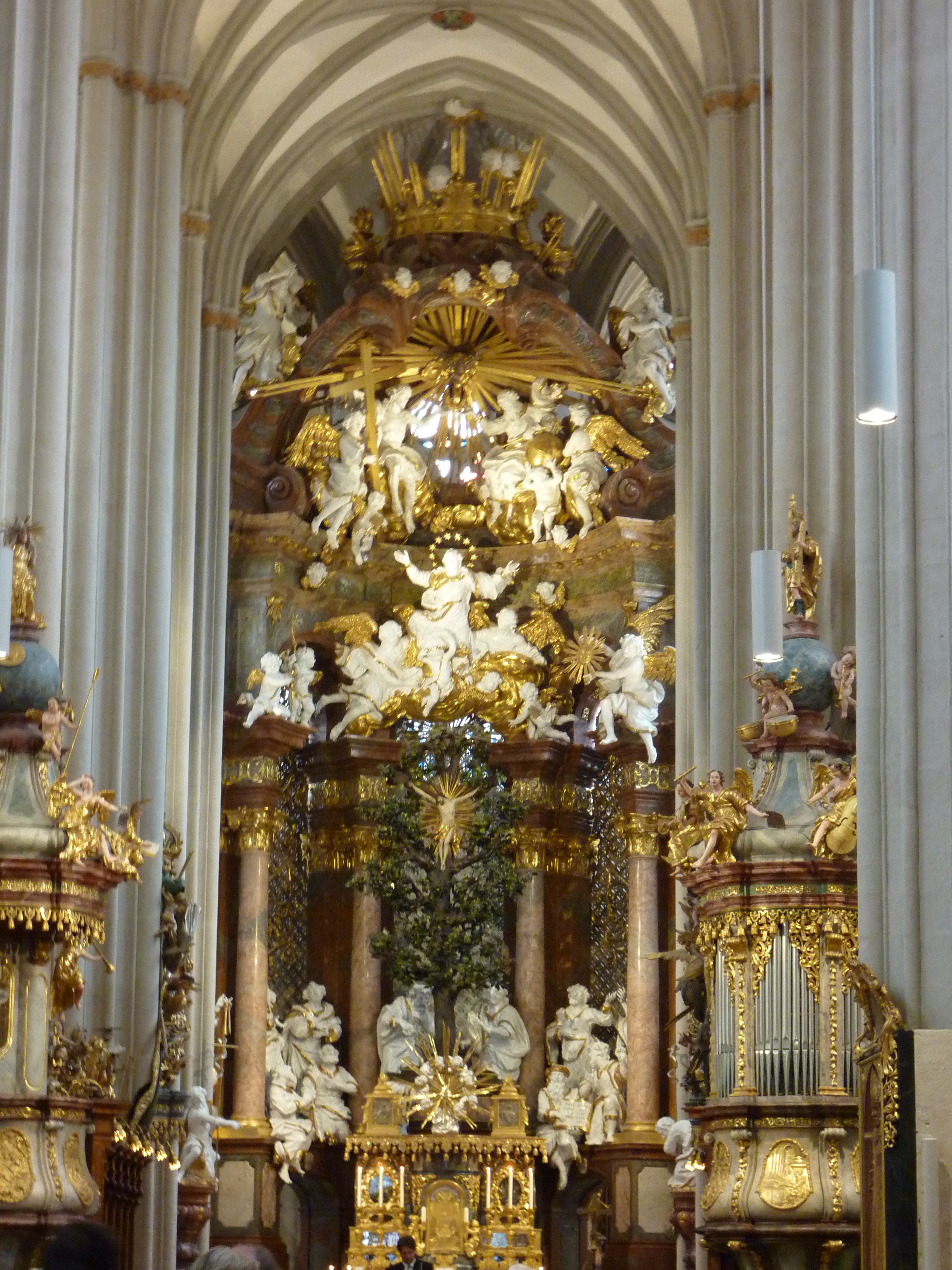 Stifts- und Pfarrkirche Zwettl, Niederösterreich (Foto aufgenommen am 15.9.2013, Tag der Wiederöffnung nach vierjähriger Restaurierung)